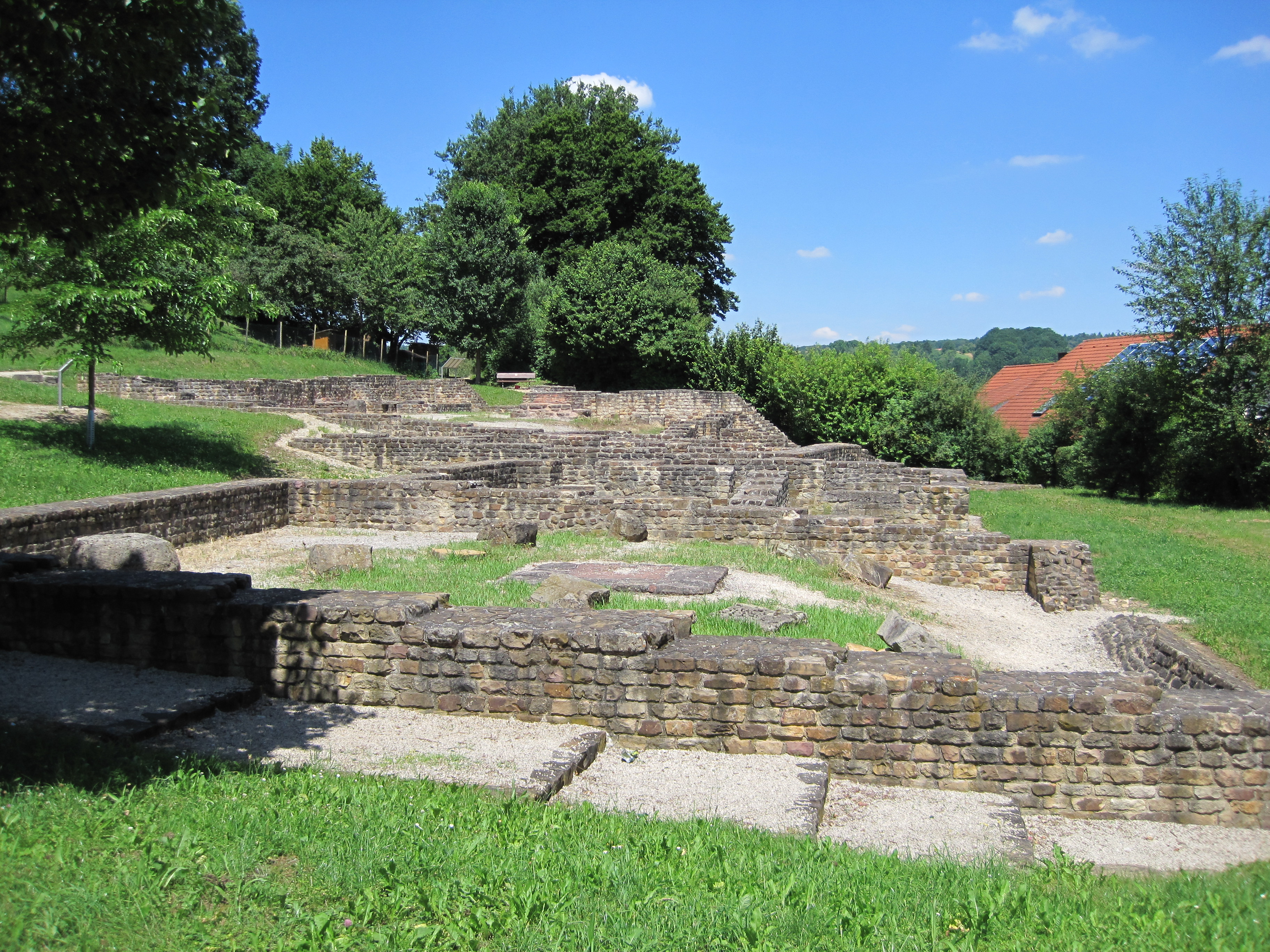 In D-72622 Nürtingen-Oberensingen ausgegrabene Überreste eines römischen Gutshofs (Villa Rustica), um 100 n. Chr.